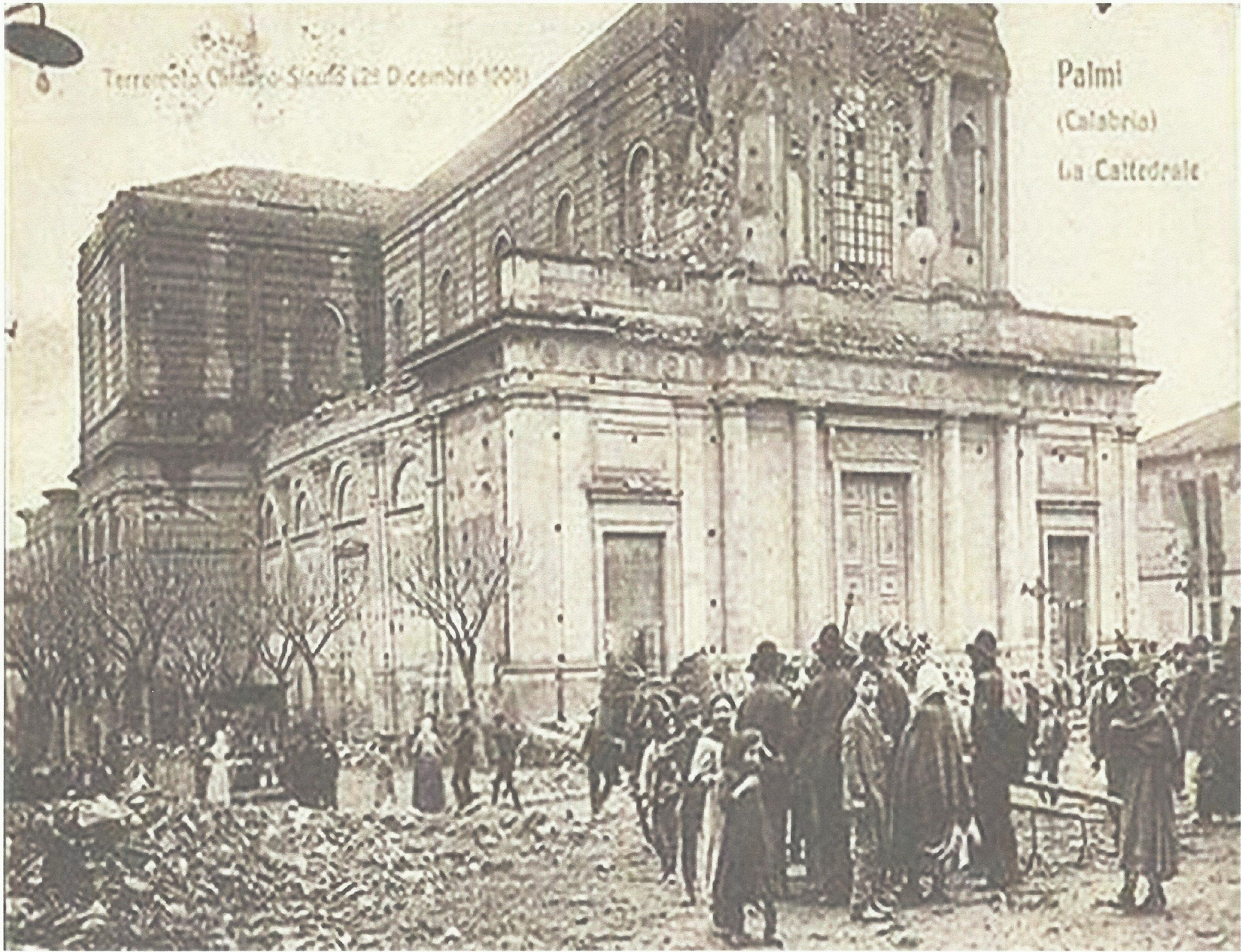 La vecchia Chiesa Matrice di San Nicola distrutta dal terremoto del 1908